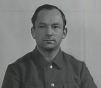 Heinz Karl Fanslau (* 6. Juni 1909 in Düringshof bei Landsberg/Warthe; † 10. März 1987 in München) war ein deutscher SS-Führer. Fanslau wurde in den Nürnberger Prozessen angeklagt und als Kriegsverbrecher verurteilt.